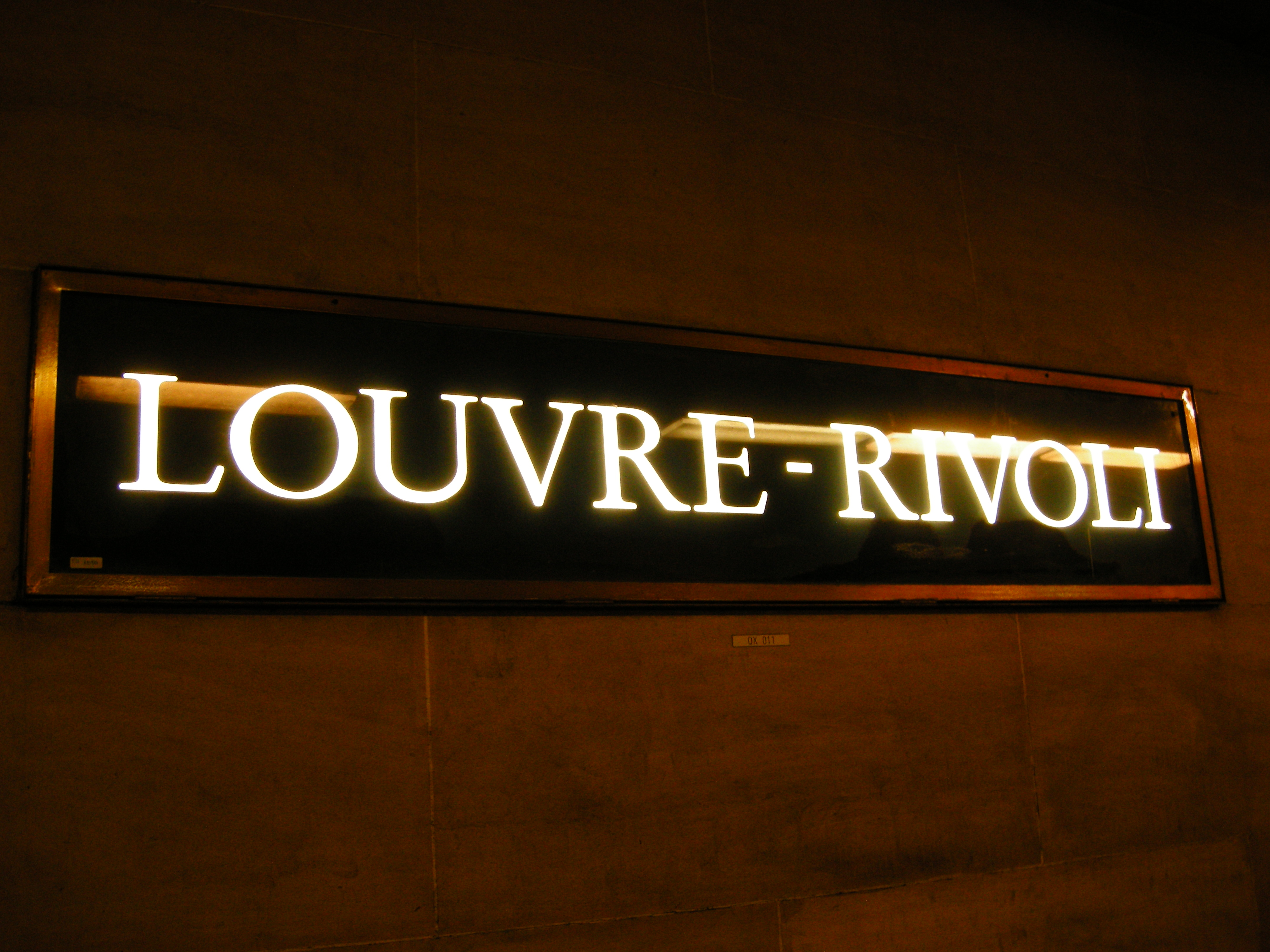 Le Caractere de la Station Louvre Rivoli